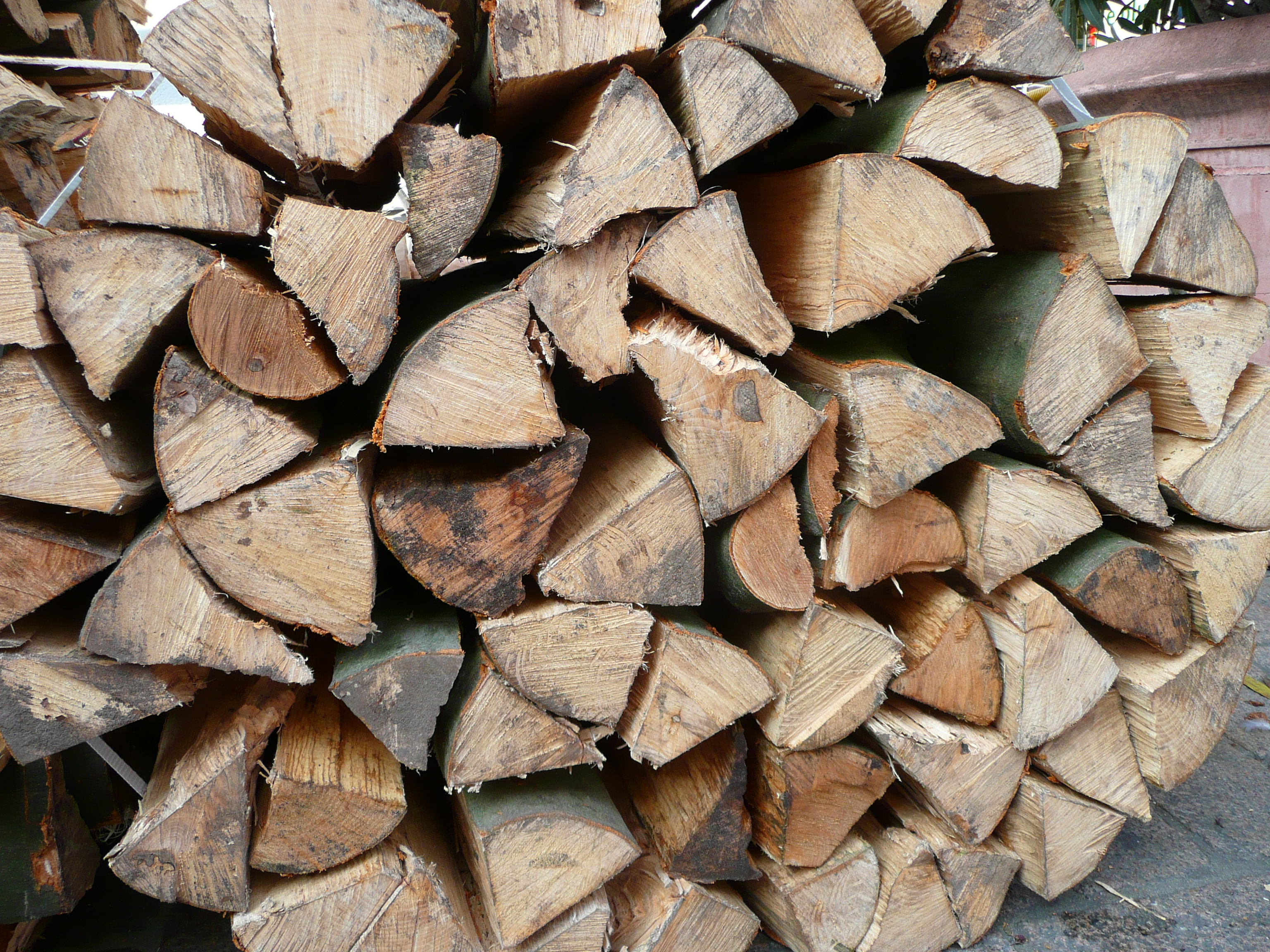 Brennholzstapel aus Buchenholz